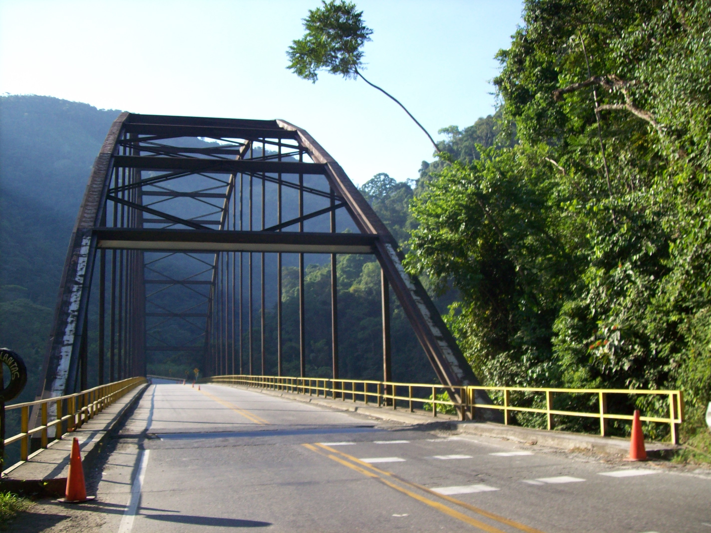 Puente sobre el Samaná Norte, Colombia.